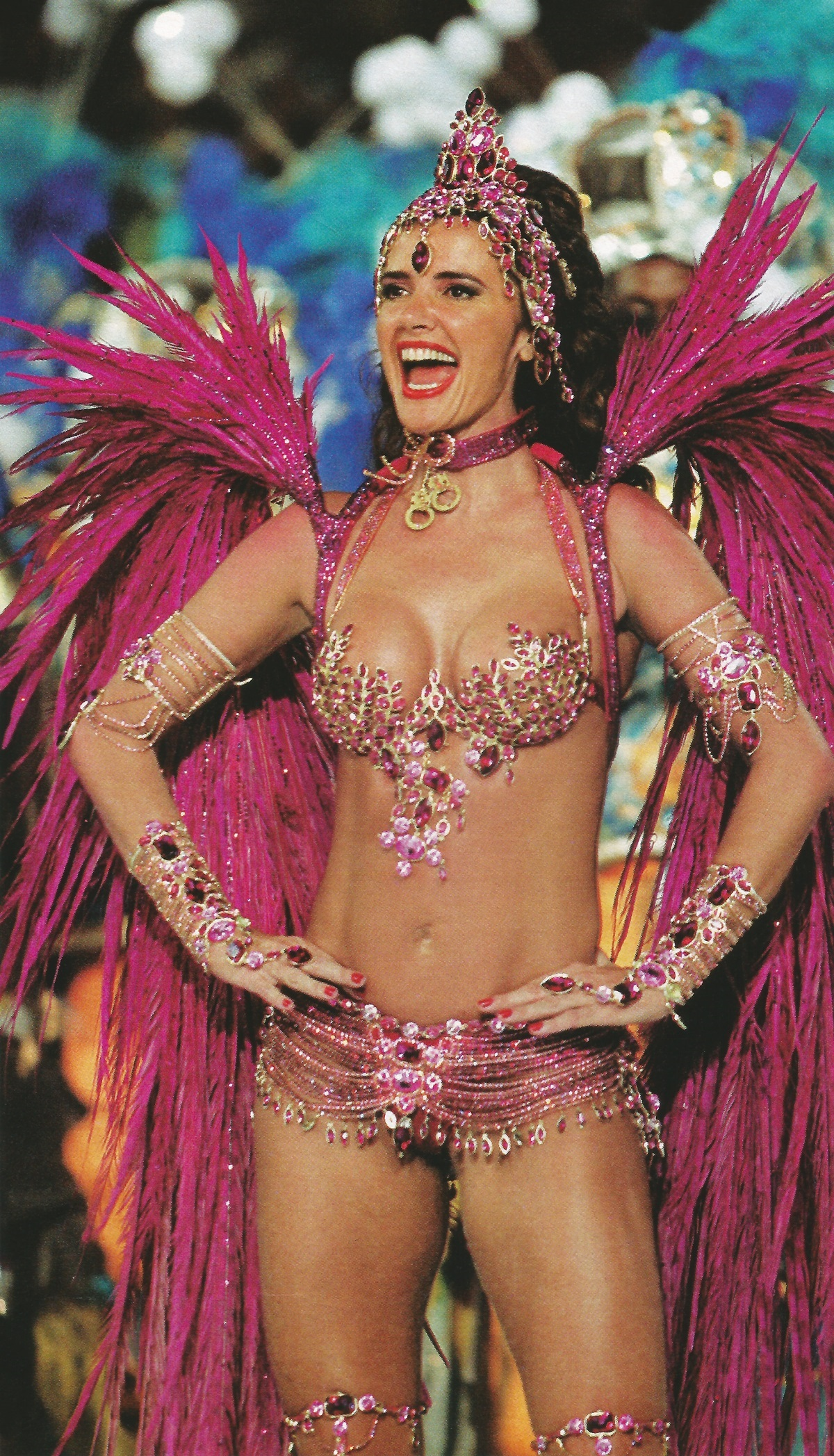 Desfile da Caprichosos de Pilares no Carnaval de 2005